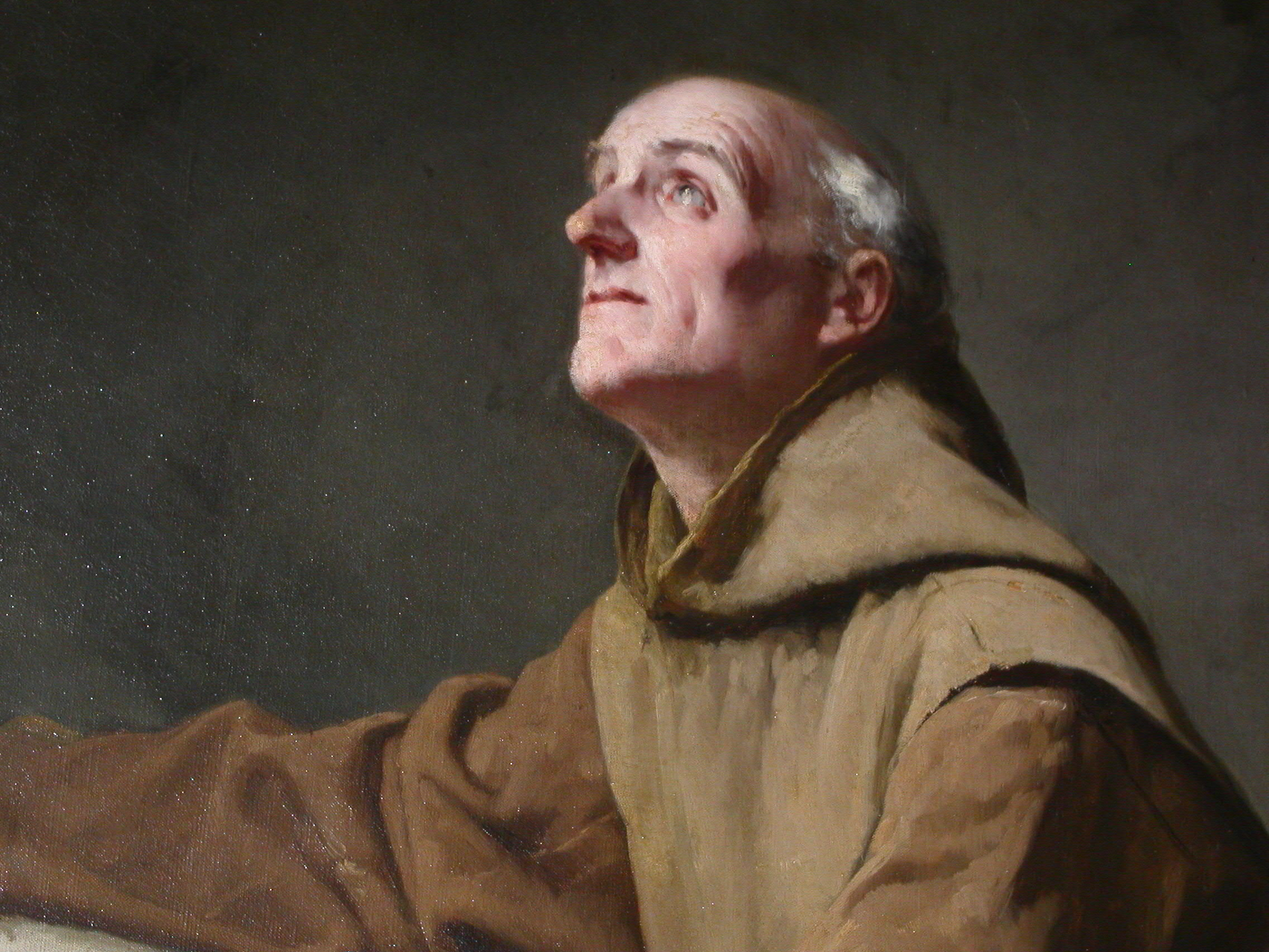 Détail